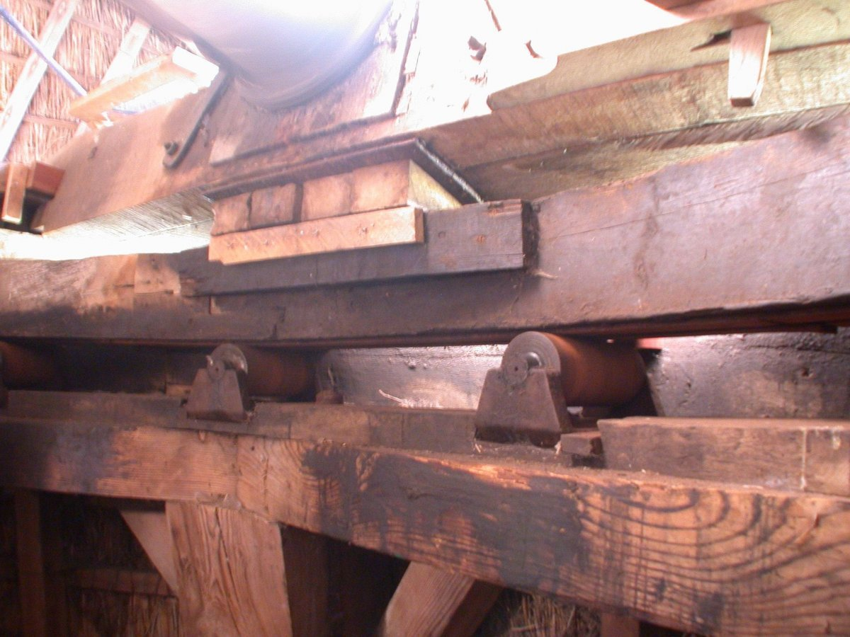 Victor/ Ten-Bruggencatenummer: 03048: Interieur achtkante grondzeiler (opmerking: Foto gemaakt in het kader van het project Actualisering Monumentenregister (AMR).)